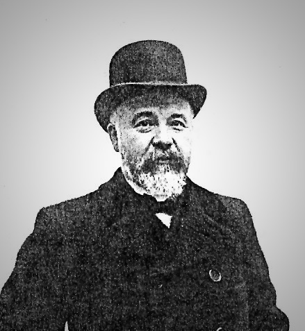 El arquitecto francés Norbert Maillart, quien diseñó para el Estado Argentino los edificios del Palacio de Correos, el Palacio de Justicia y el Colegio Nacional de Buenos Aires.